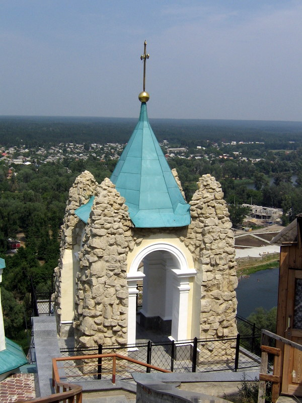 Svyatogirs'kaya Lavra 25.jpg